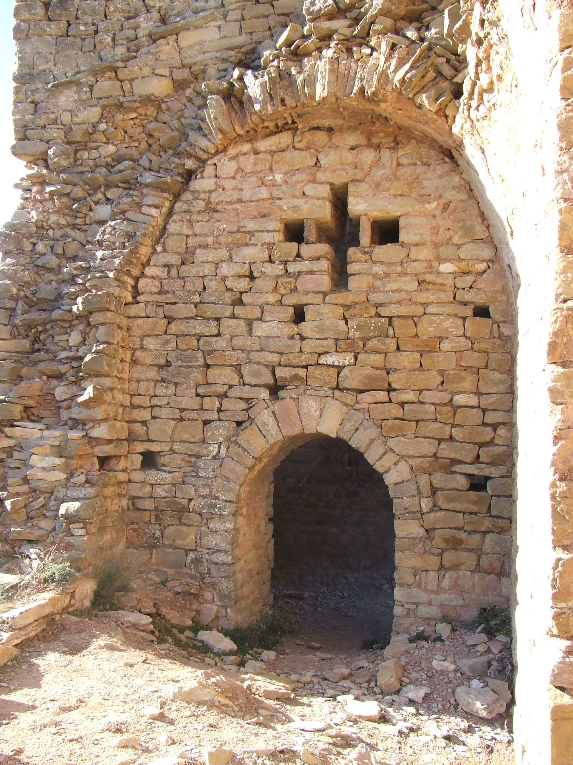 Pas de la nau col·lateral de llevant al campanar (Castell de Llordà, Isona i Conca Dellà, Pallars Jussà)